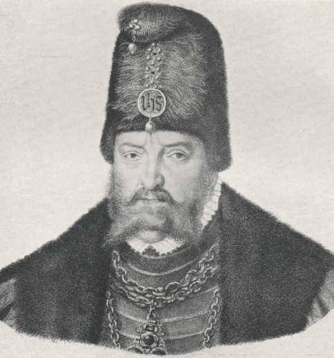 Joachim II of Brandenburg